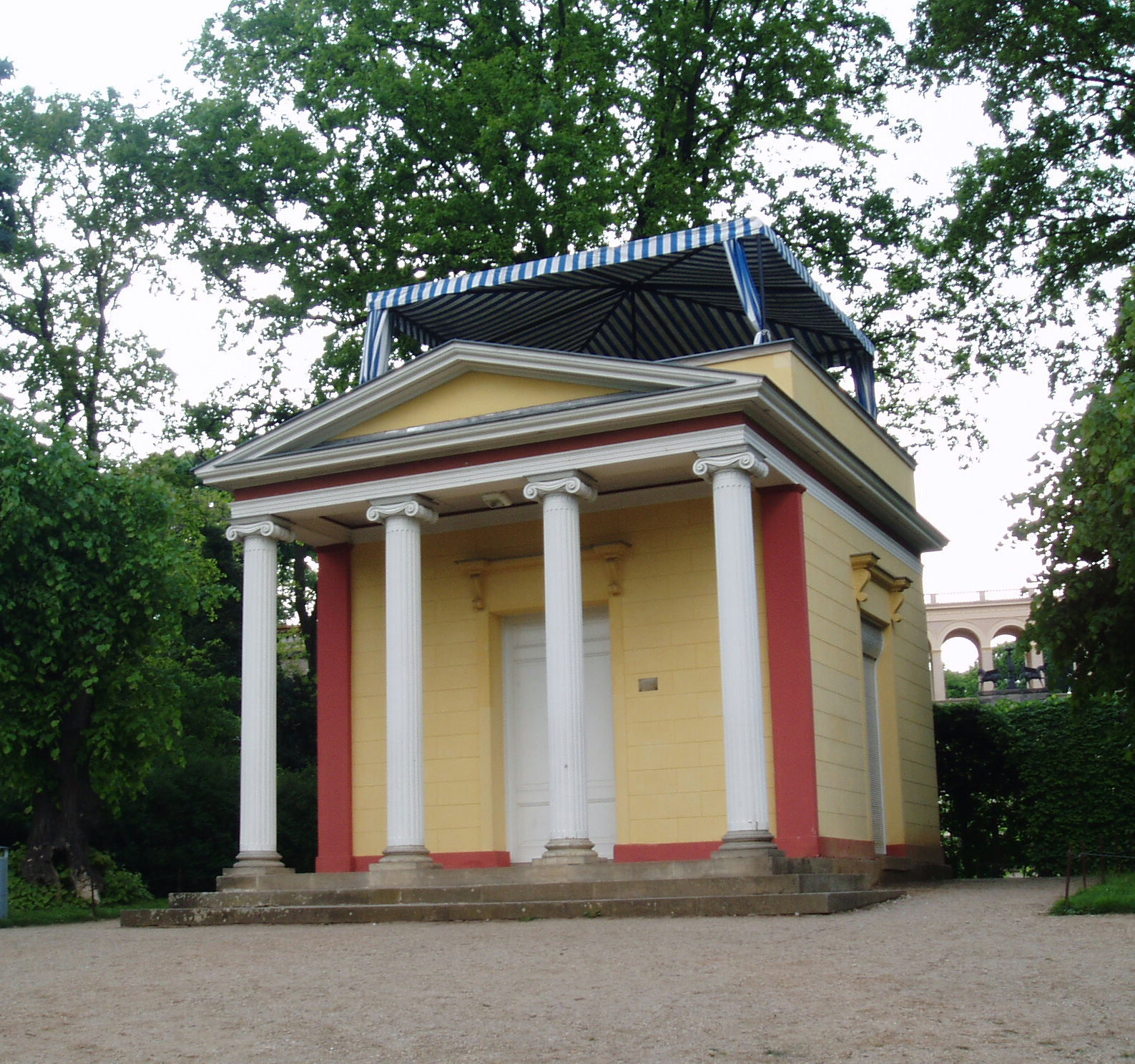 Pomonatempel Potsdam (Temple of Pomona in Potsdam)